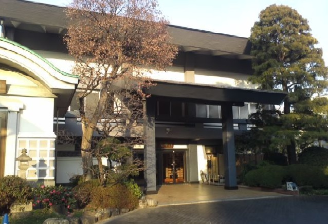 日蓮正宗 久遠山 常泉寺